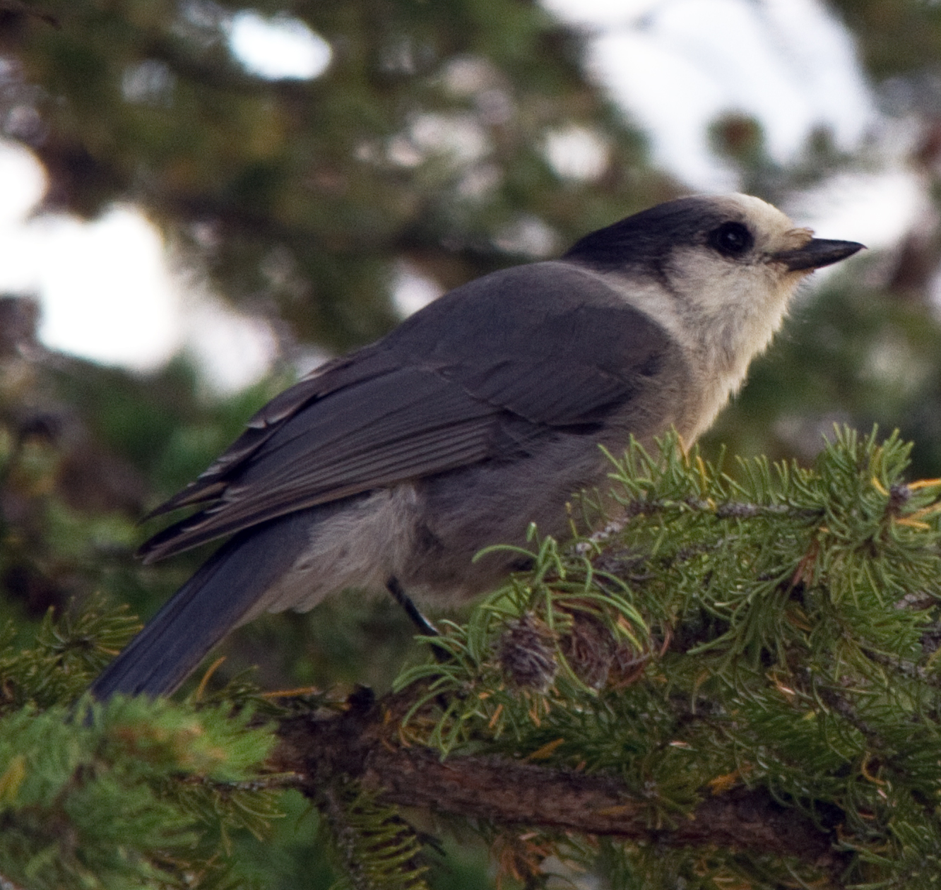 Grey Jay 4